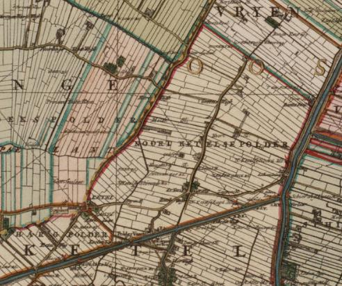 Noord Kethelse polder.